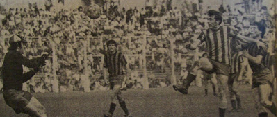 RC-SLzo MdP. Gol de Silvio Fógel